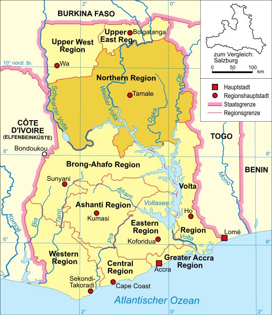 Politische Karte Ghanas (Northern Region hervorgehoben)